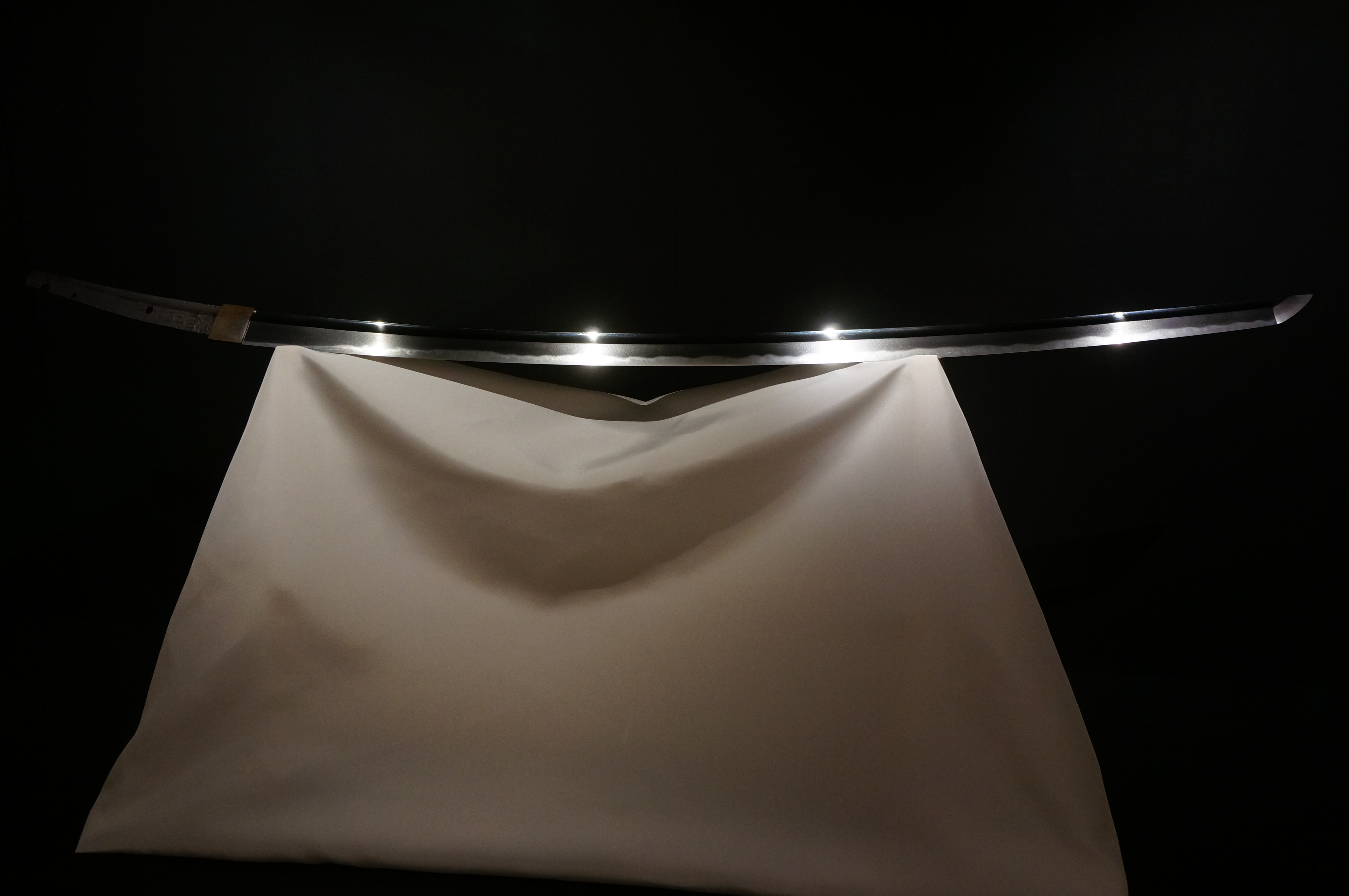 大包平、東京国立博物館にて